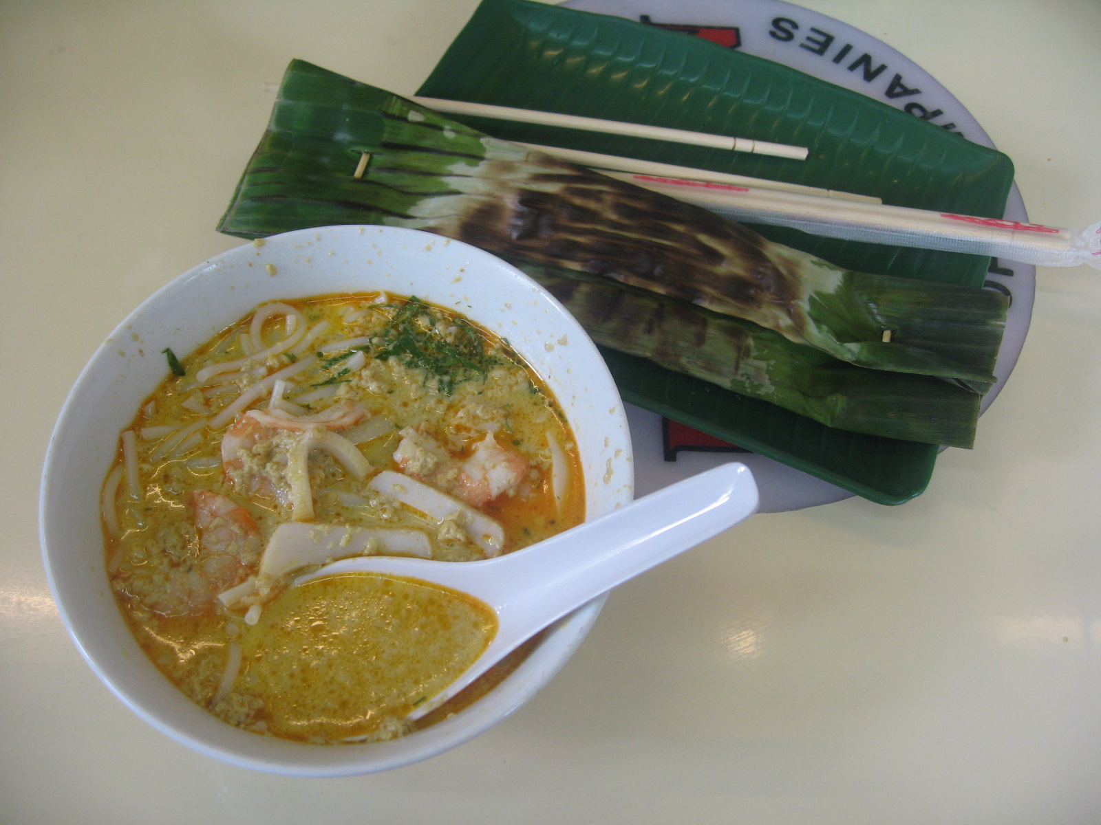 Katong laksa and banana leaf otah.